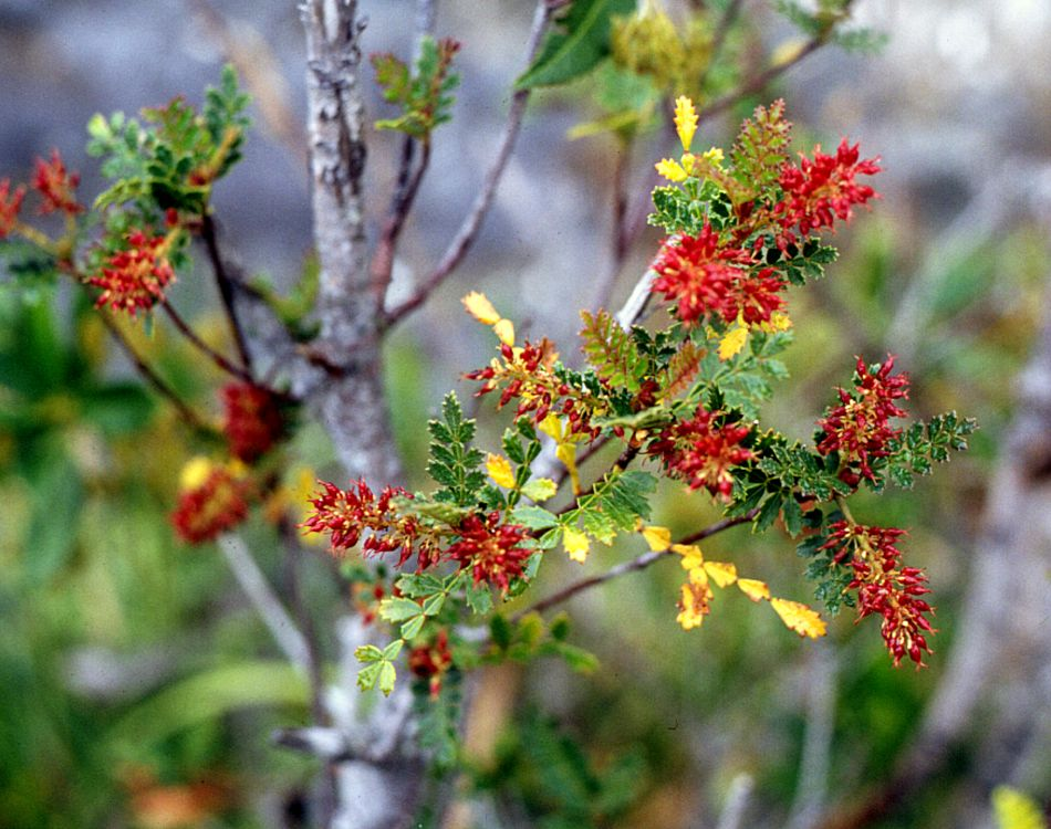 Weinmannia trichosperma, Cunoniaceae - Chile, Salto de Petrohué (Prov. de Llanquihue)